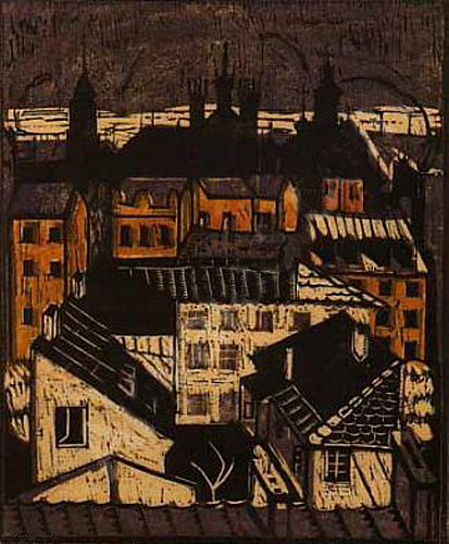 Stare Miasto w Warszawie